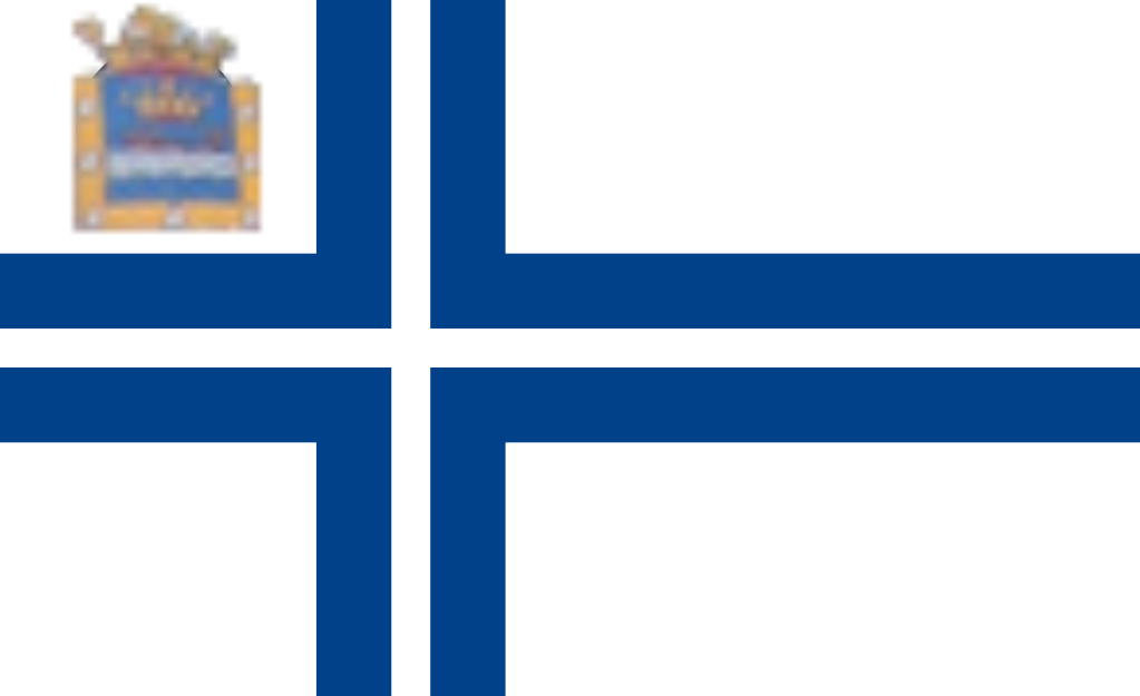 Ensign of the Helsingfors Segelsällskap